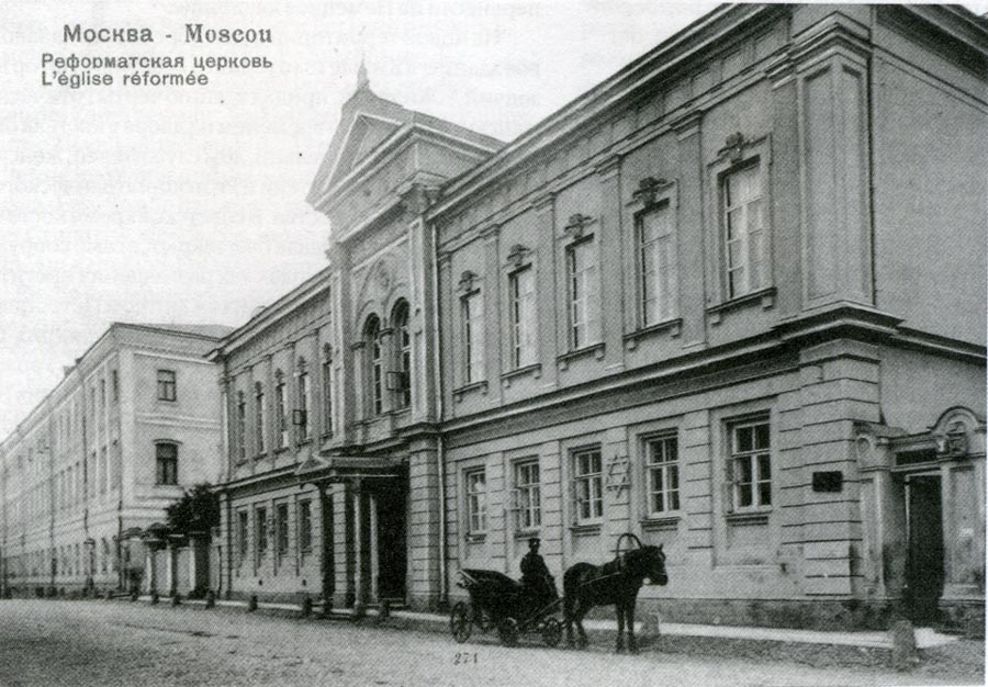 Реформатская церковь в Москве, 1903 г.